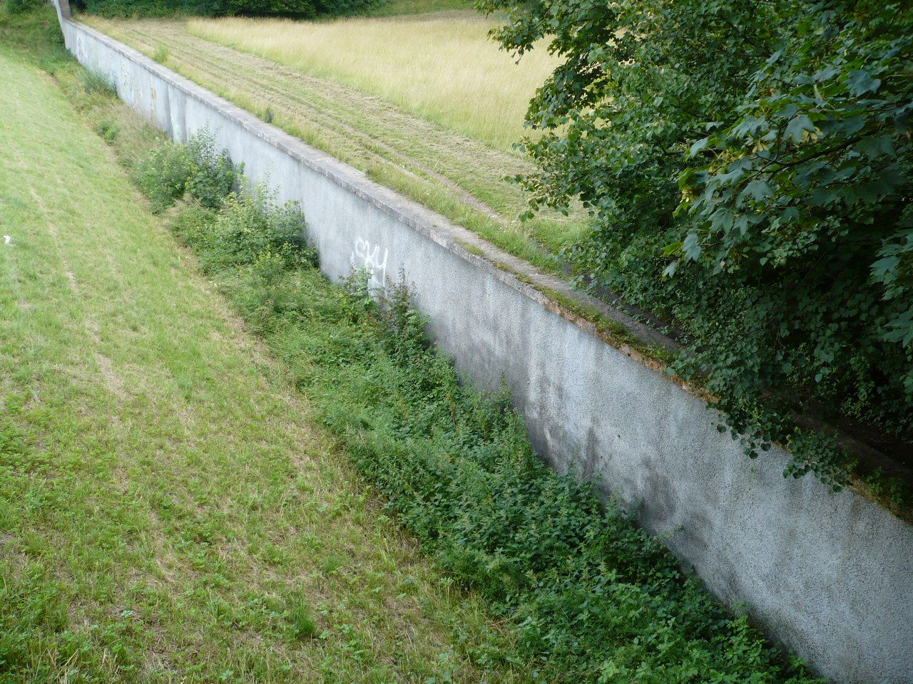 Abgesenkte Gartenmauer (Durchblick) des Nymphenburger Parks in München